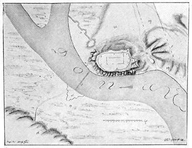 Petrovaradin 1692